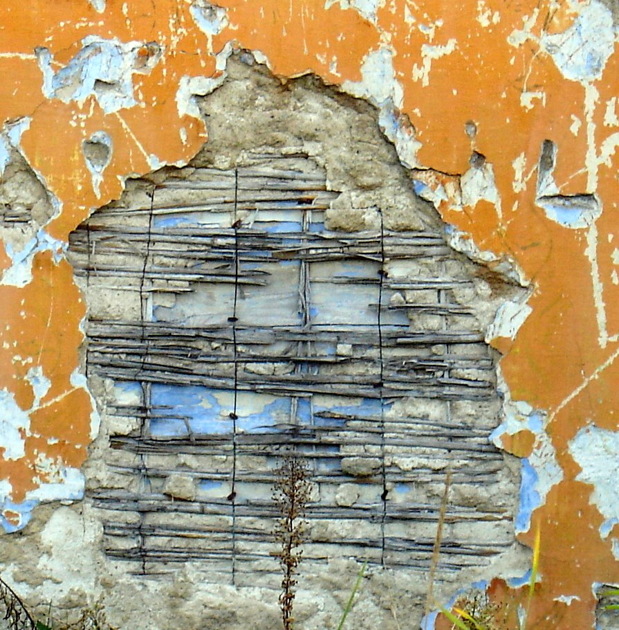 Tynk na trzcinie (plasterwork on a reed mat)